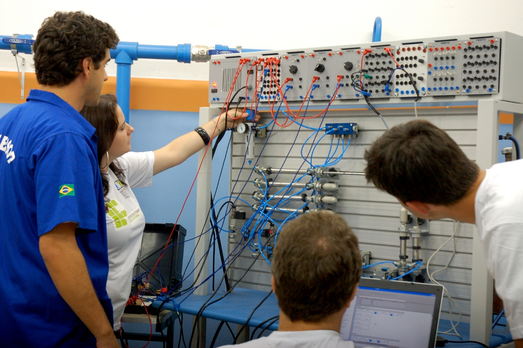 Aula do curso de Mecânica do Campus Chapecó do IF-SC